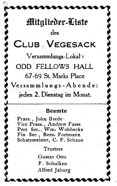 Titel Mitgliederliste "Club Vegesack" 1912